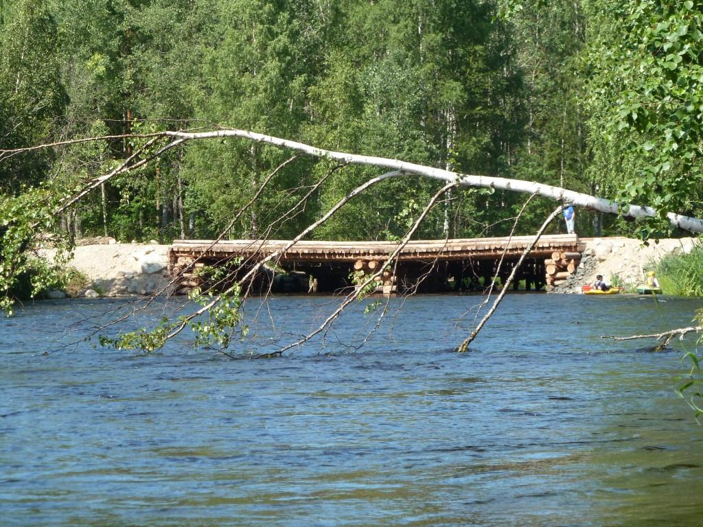 Река Сяпся, "Манин мост"